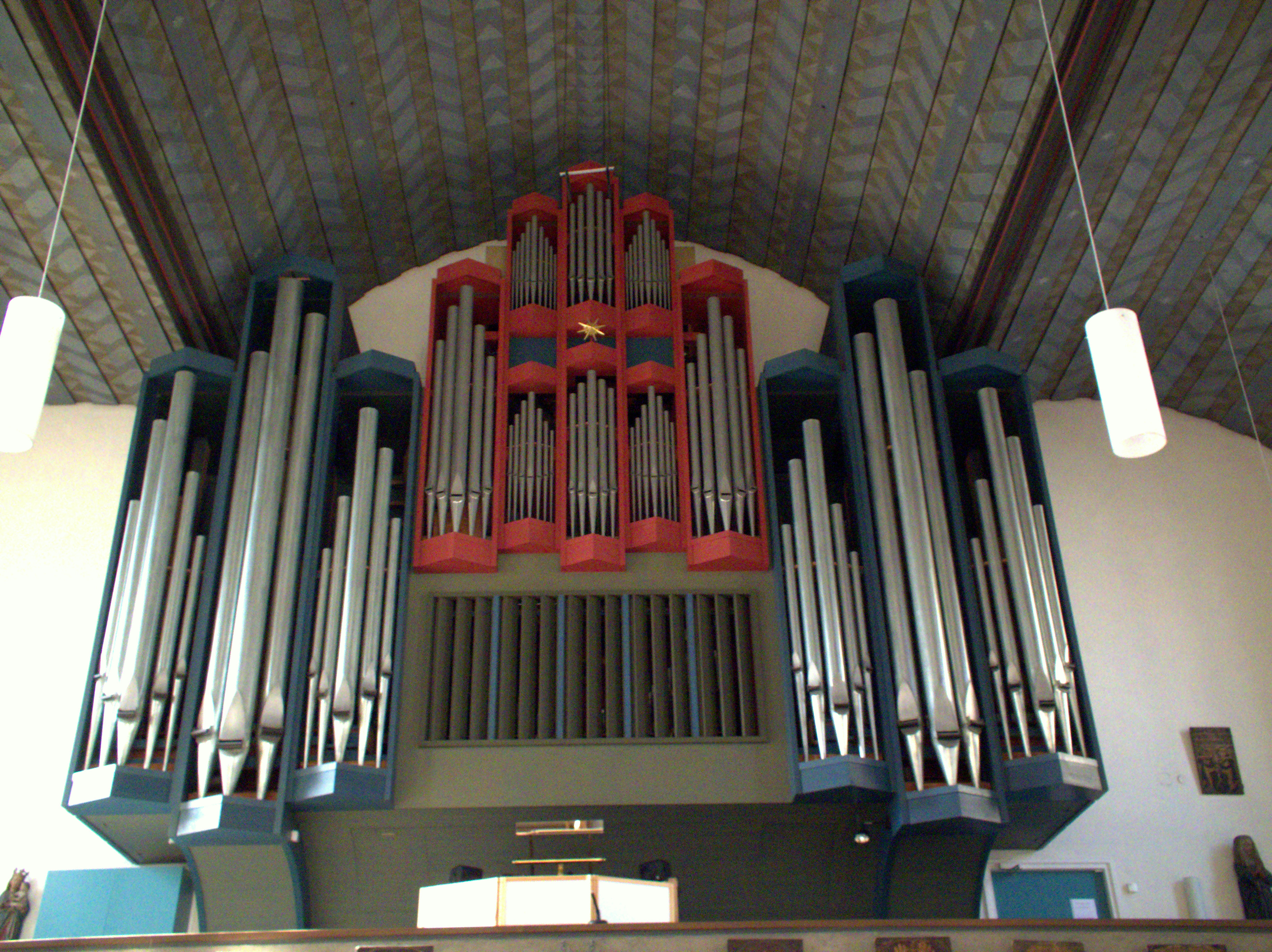 Die evangelische Pfarrkirche St. Jakob in Nürnberg